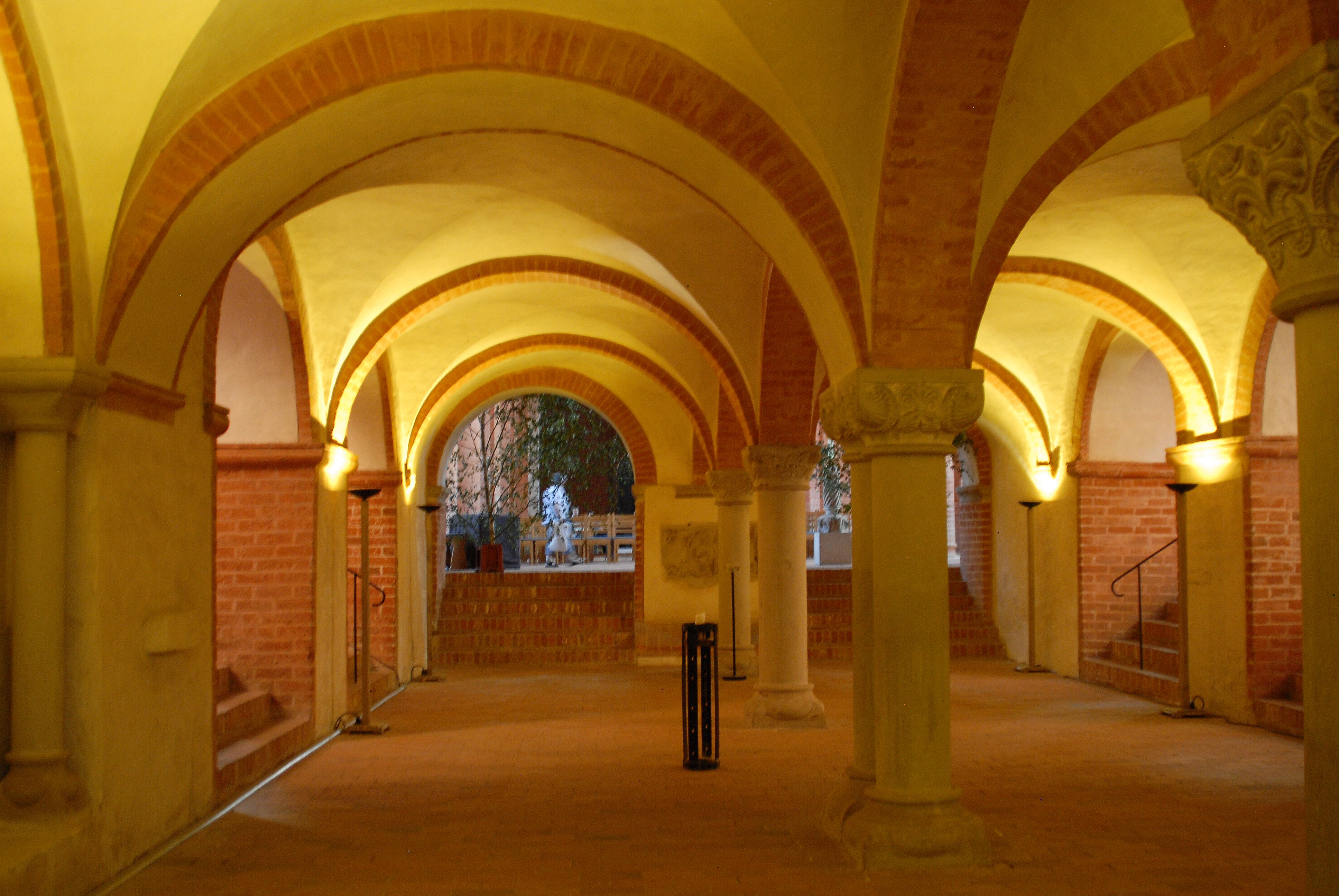 Kloster Jerichow, untere Ebene des Kirchenraumes